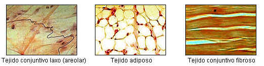 Algunos tejidos conjuntivos (1/2)